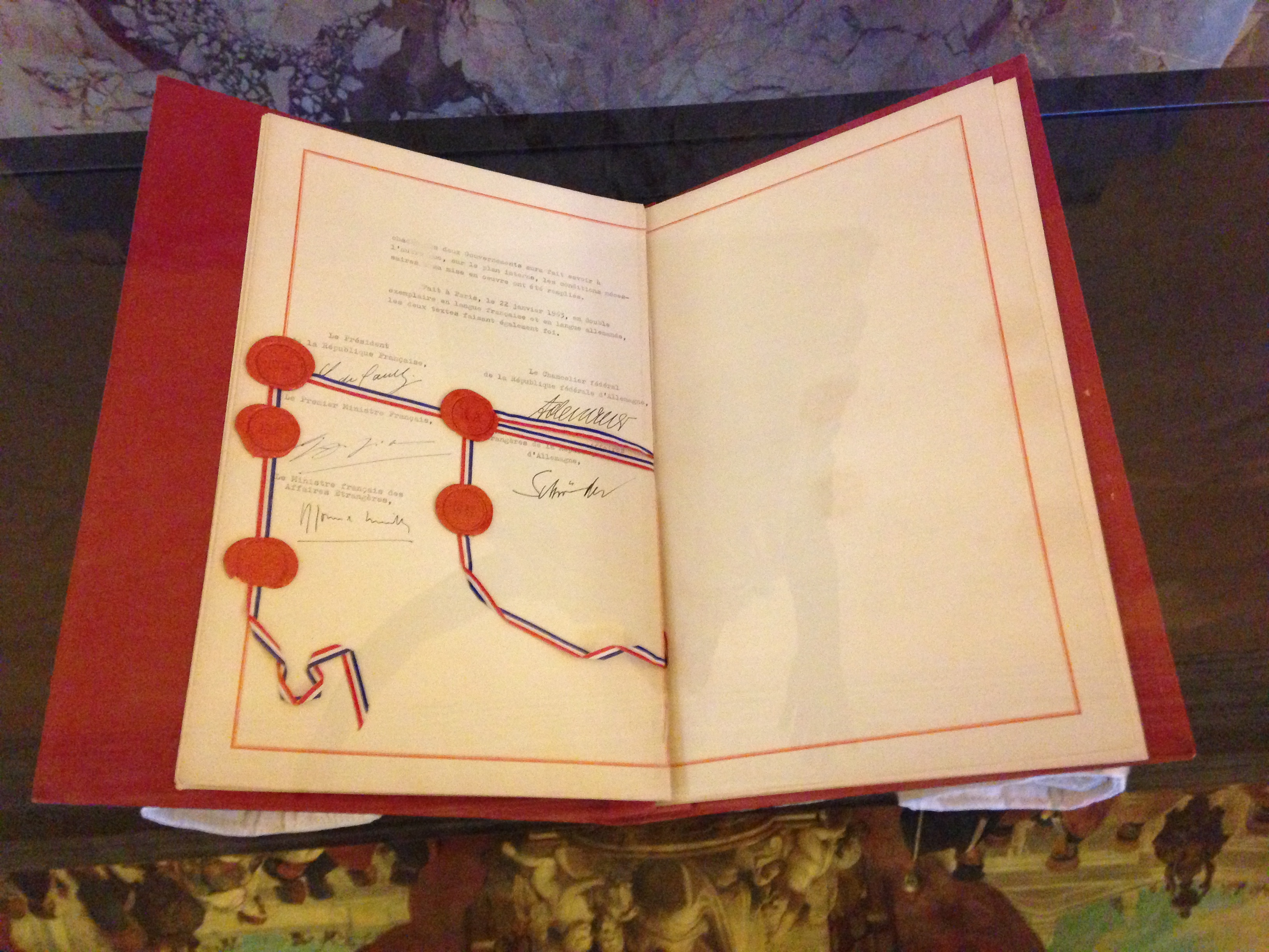 Dernière page paraphée du Traité franco-allemand de l'Elysée, exposé à l'Assemblée nationale.